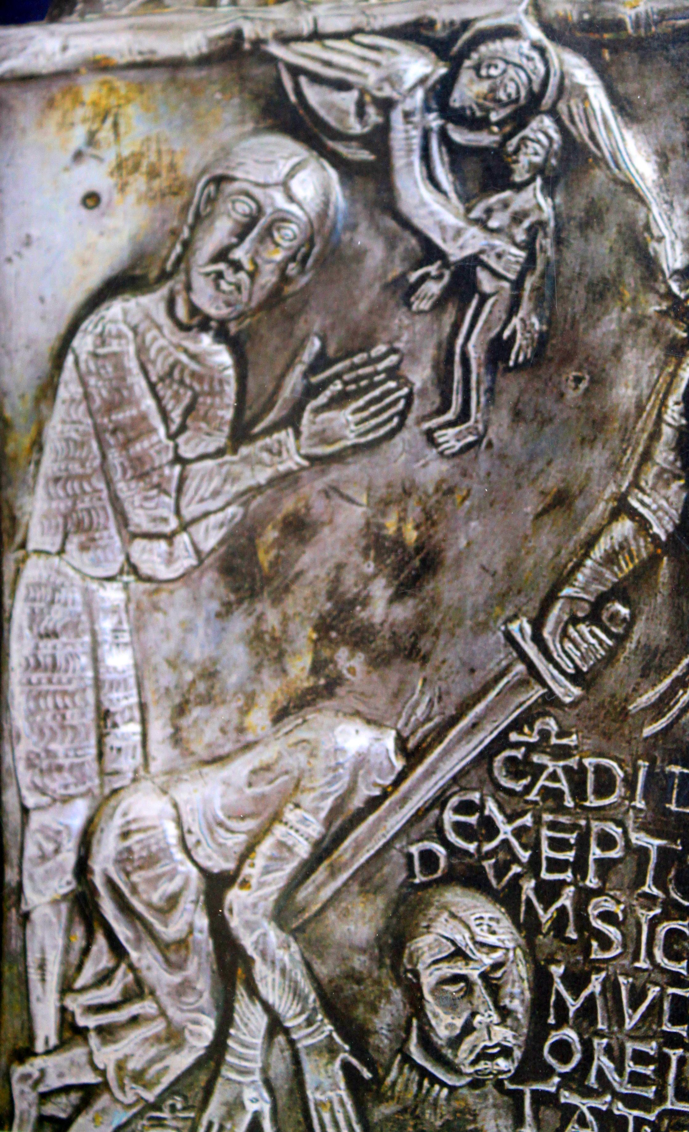 Suisse, canton du Valais, Saint-Maurice, Abbaye, trésor, détail d'une chasse.